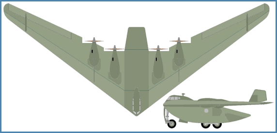 Horten IAe38